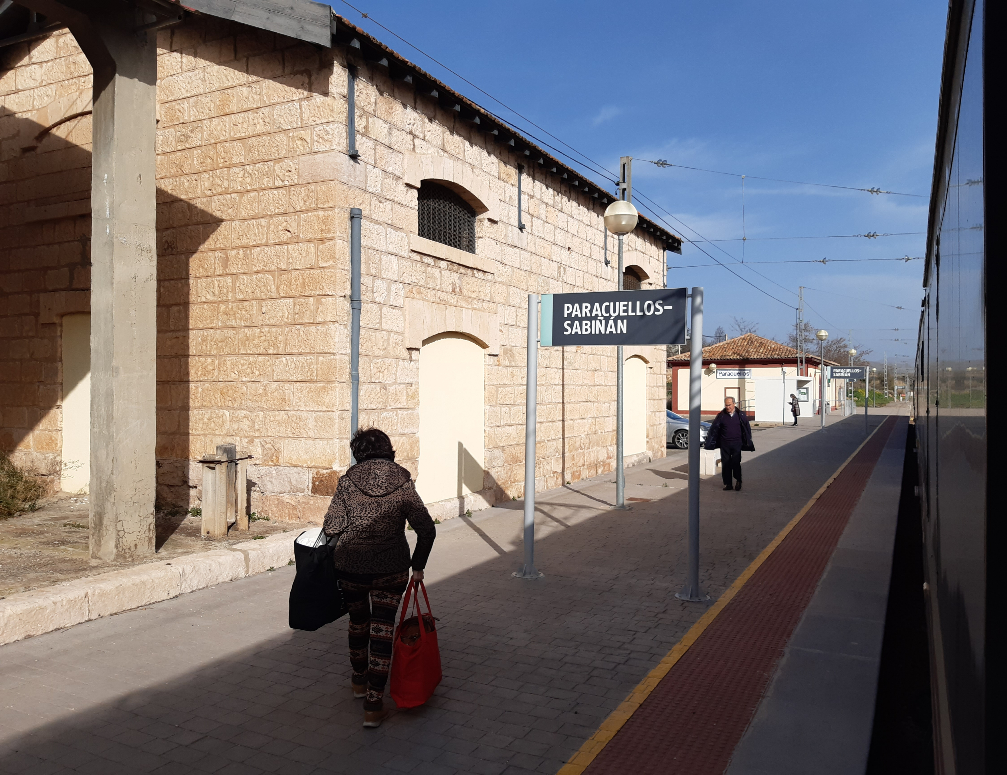 Imagen de la Estacion ferroviaria de Paracuellos-Sabiñán desde un tren Regional R-470 procedente de Lérida. Pueden verse los antiguos almacenes restaurados a la izquierda y el edificio de viajeros al fondo. Foto del 28 de febrero de 2020.